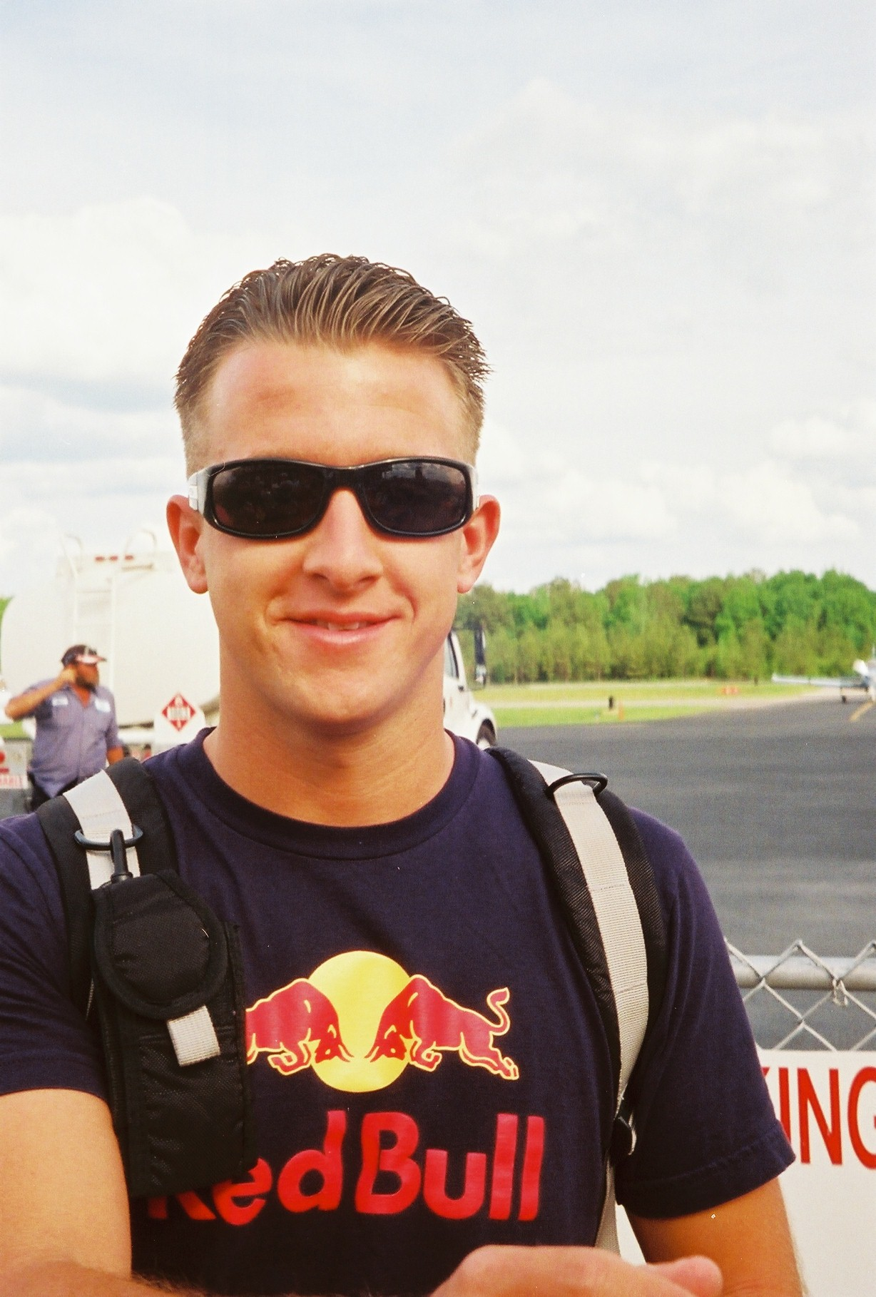 Talladega, AL 4-08 Talladega Race